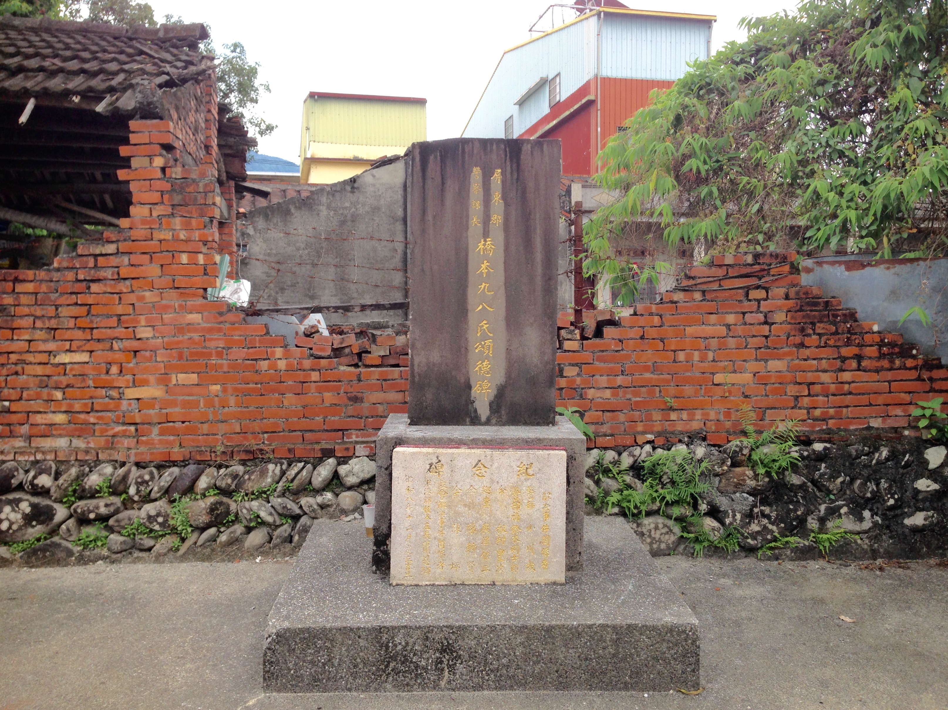 中文（台灣）: 橋本九八氏頌德碑